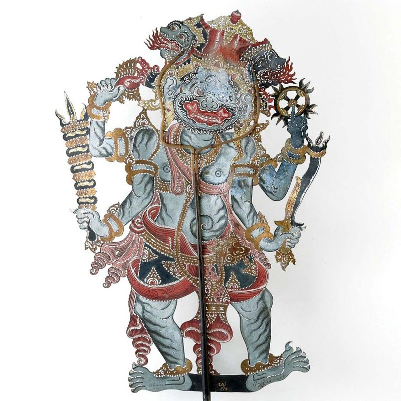 Schaduwfiguur. Deze pop stelt Wisnu voor een van de Trimurti, de drie-eenheid van de Goden; Brahma, de schepper, Wisnu de onderhouder en Siwa de vernietiger. De kleur van Wisnu is blauw (soms zwart) en hij wordt geassocieerd met de windrichting noorden, kaja. In zijn demonische vorm is hij Kala Ireng, die regeert over de black bhuta's, demonen. Zijn attributen in zijn handen zijn een werprad (cakra), een knots (gada), een schelp en een dolk. Urs Ramseyer, The Art and Culture of Bali, Oxford University Press, 1977. Wajangpop voorstellende Wisnu Murti behorend bij de Tripurusa of Trimurti Unknown language: Wayang